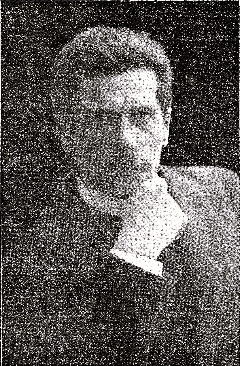 Professor Martin Dülfer aus Dresden, Erbauer des Stadttheaters zu Lübeck